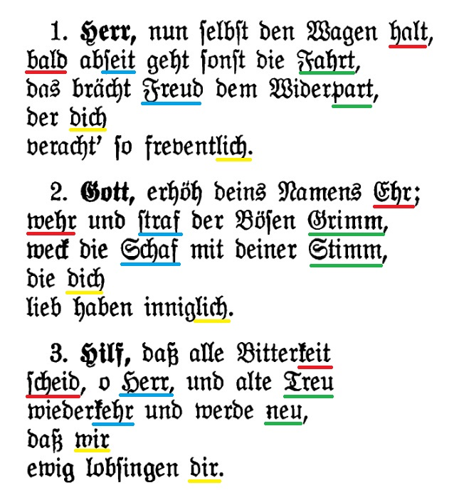 Friedrich Spittas Nachdichtung von Zwinglis Herr, nun heb den wagen selb. Spitta behielt Zwinglis kunstvolles Reimschema bei, hier farbig markiert.